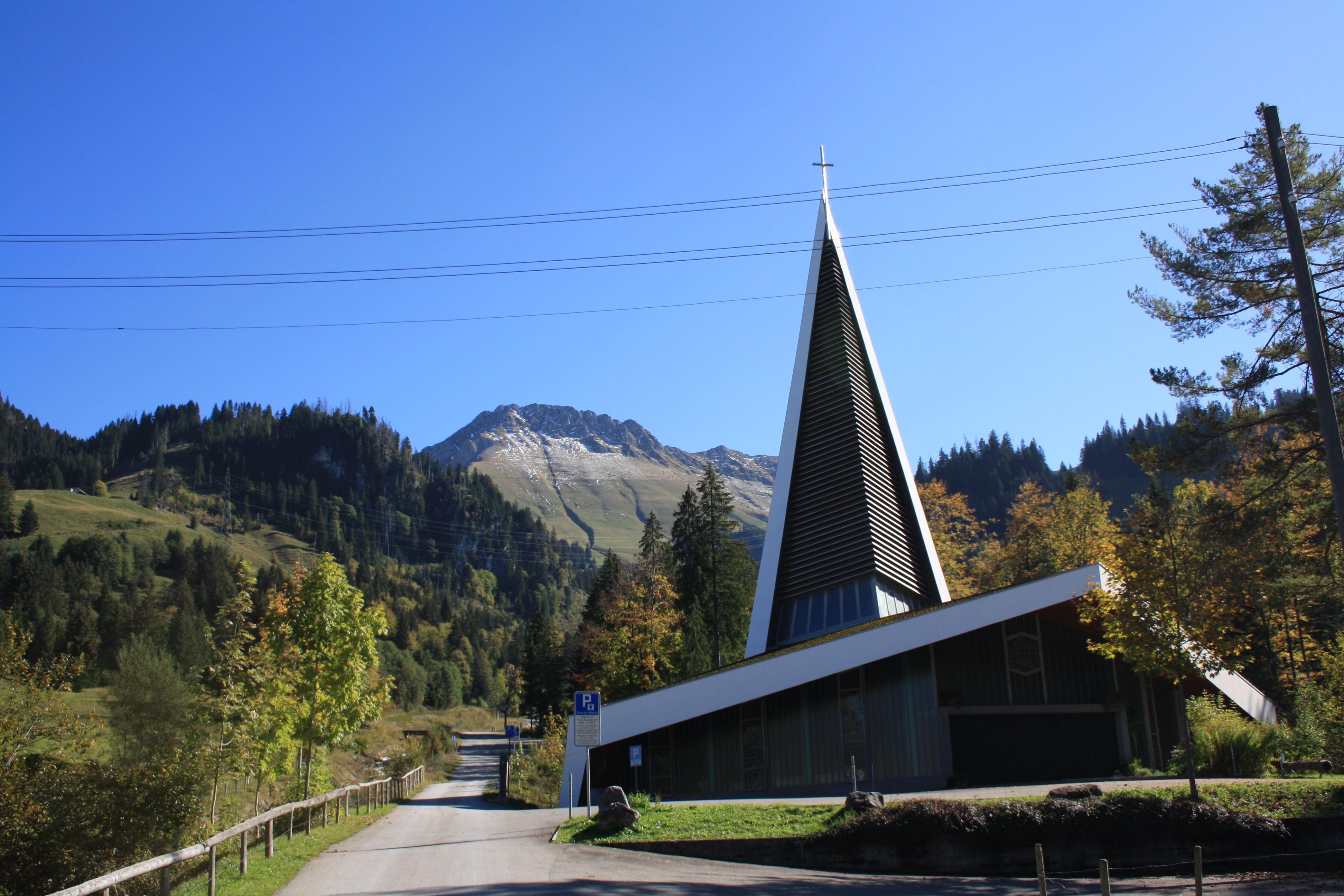 Bruder-Klaus-Kirche, Schwarzsee